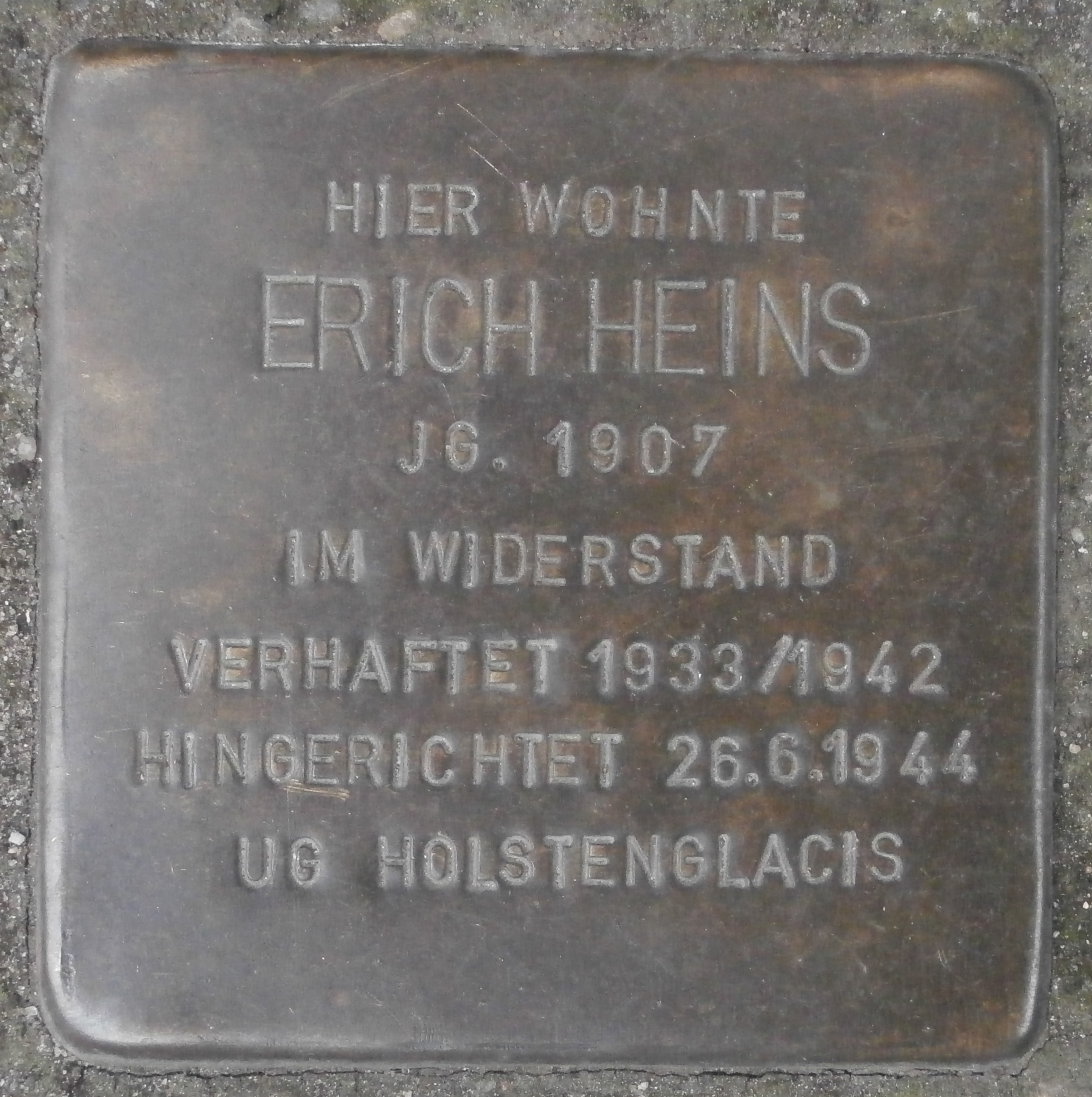 Stolperstein für Erich Heins